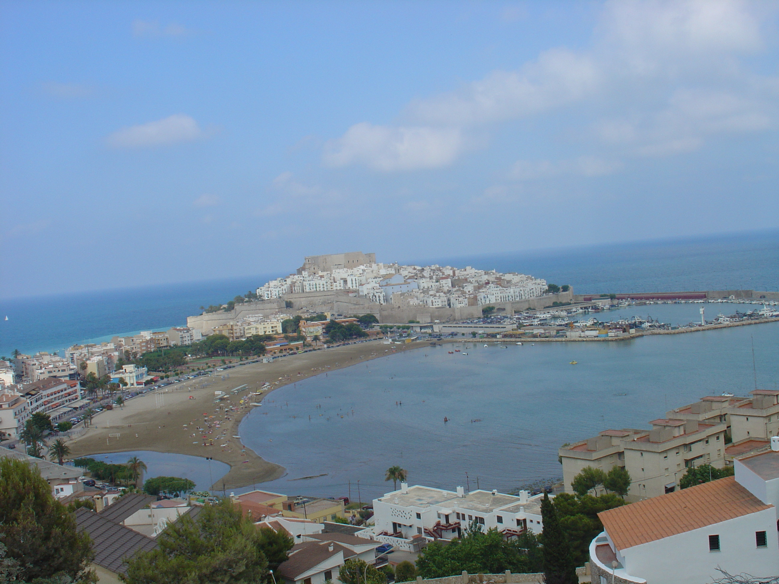 Peñiscola : Le château et le port